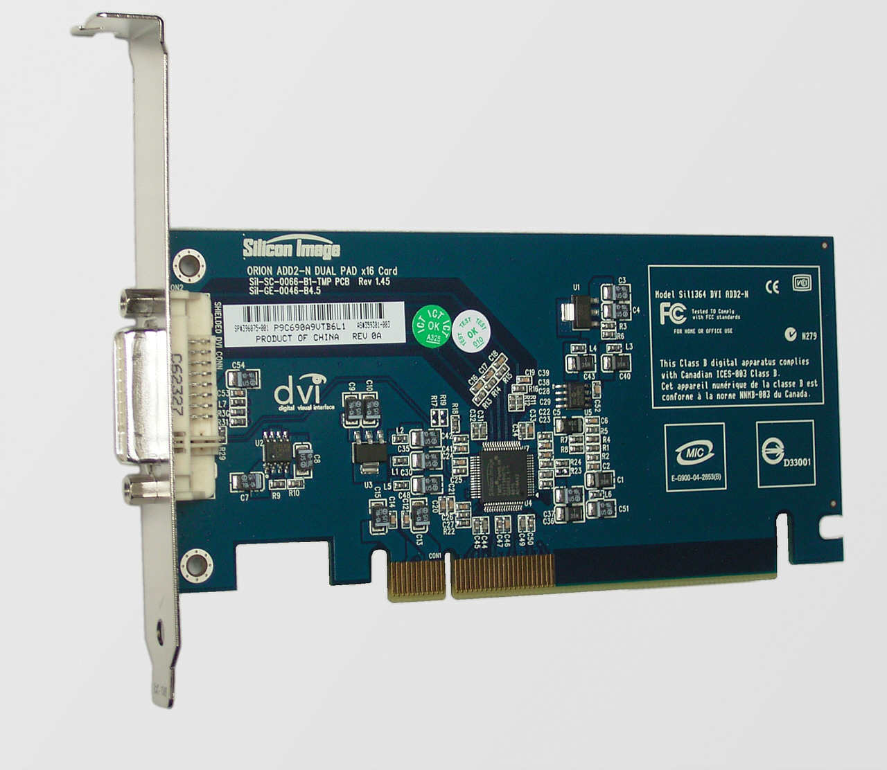 DVI-Addon-Karte für geeignete Mainboards mit integrierter Onboard-Grafik, hier für den Intel 945G-Chipsatz. Die Karte wird im PCIe-16-Slot montiert.